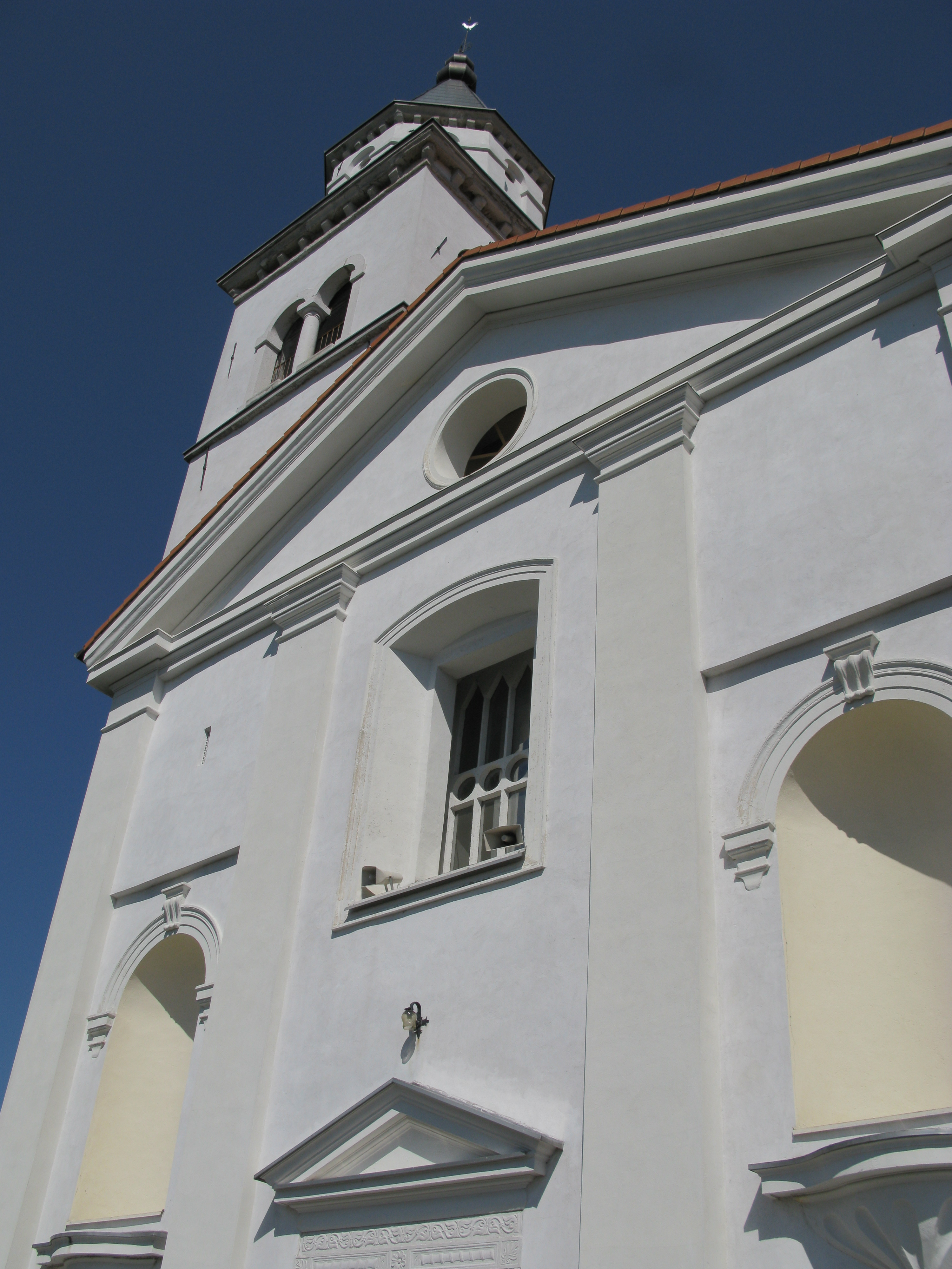 Slovenija : Ajdovščina : Sveti Križ